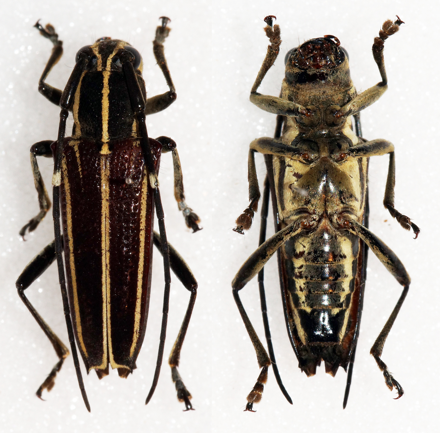 Newman,1832 Sex: Male Data: 08-2014 - Mt Kanlaon - 900m - Negros Island - Philippines Size: 14mm